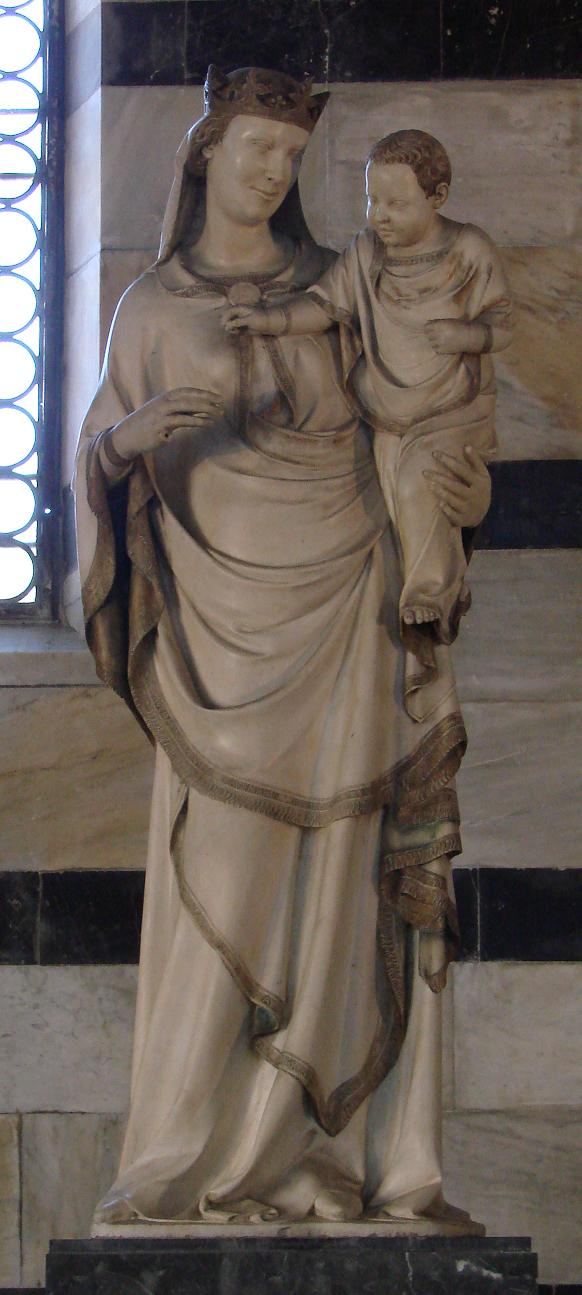 Andrea Pisano, Madonna della Rosa, Marmo, 1345-1347, Chiesa di Santa Maria della Spina, Pisa